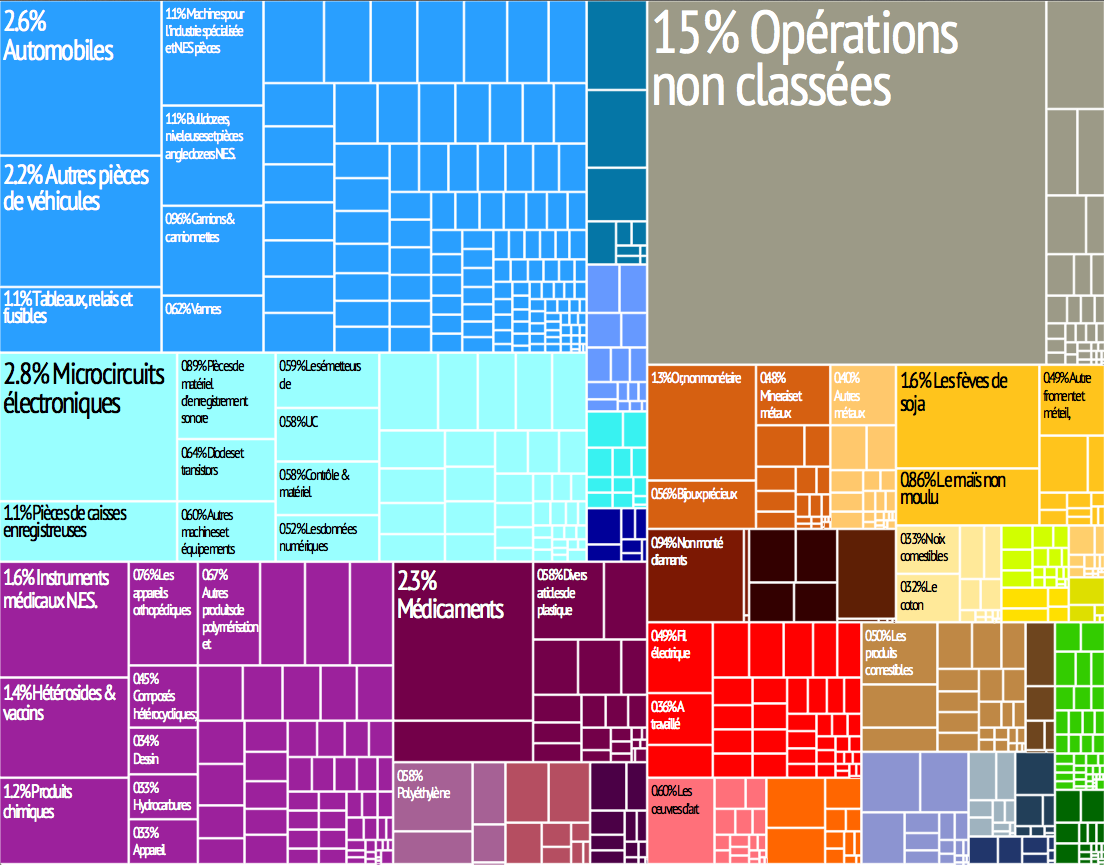 Représentation graphique des exportations de produits du pays dans 28 catégories de couleur. Chaque case de couleur représente un produit et sa taille est proportionnelle à la part des exportations totales du pays que le produit représente.